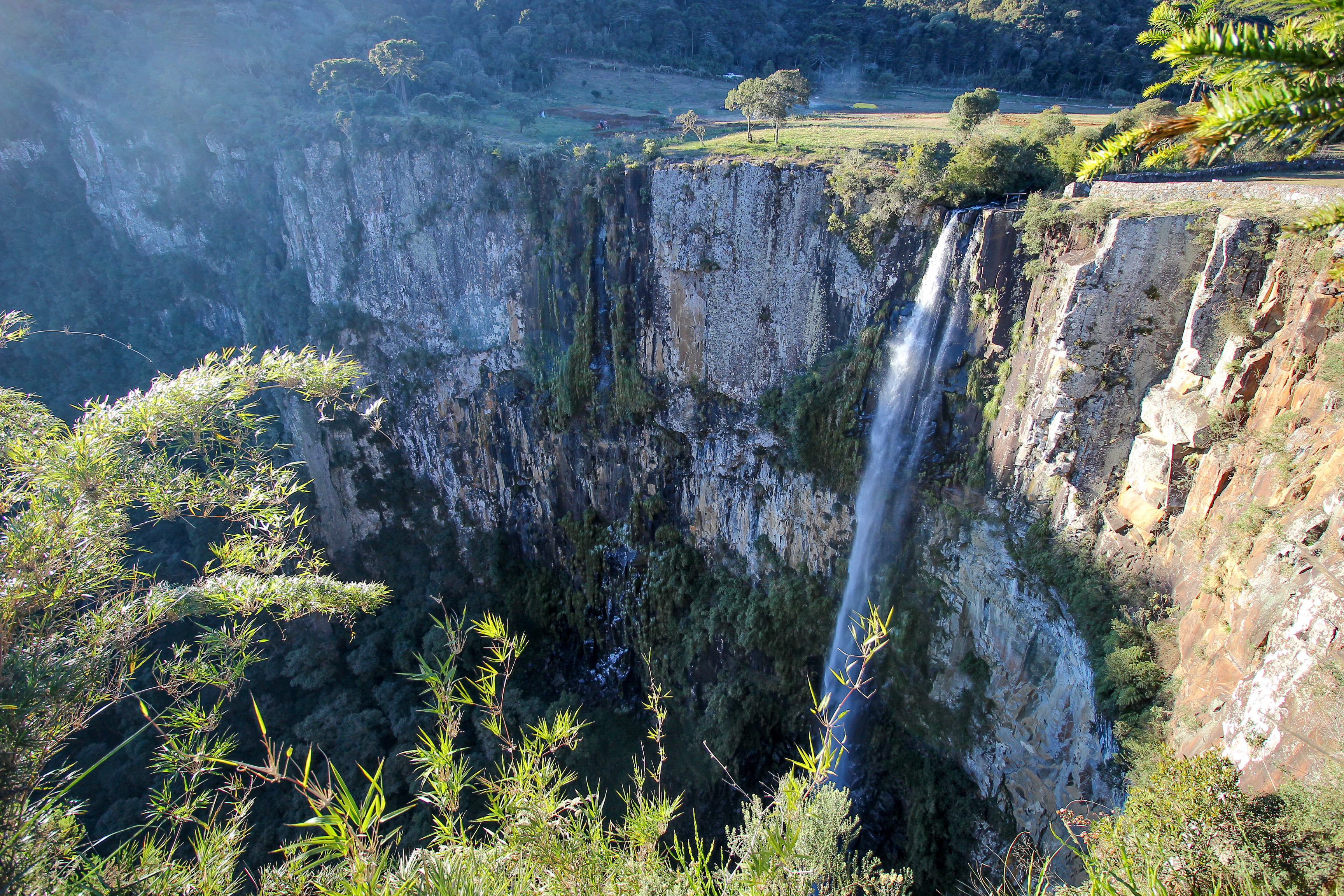 São Joaquim